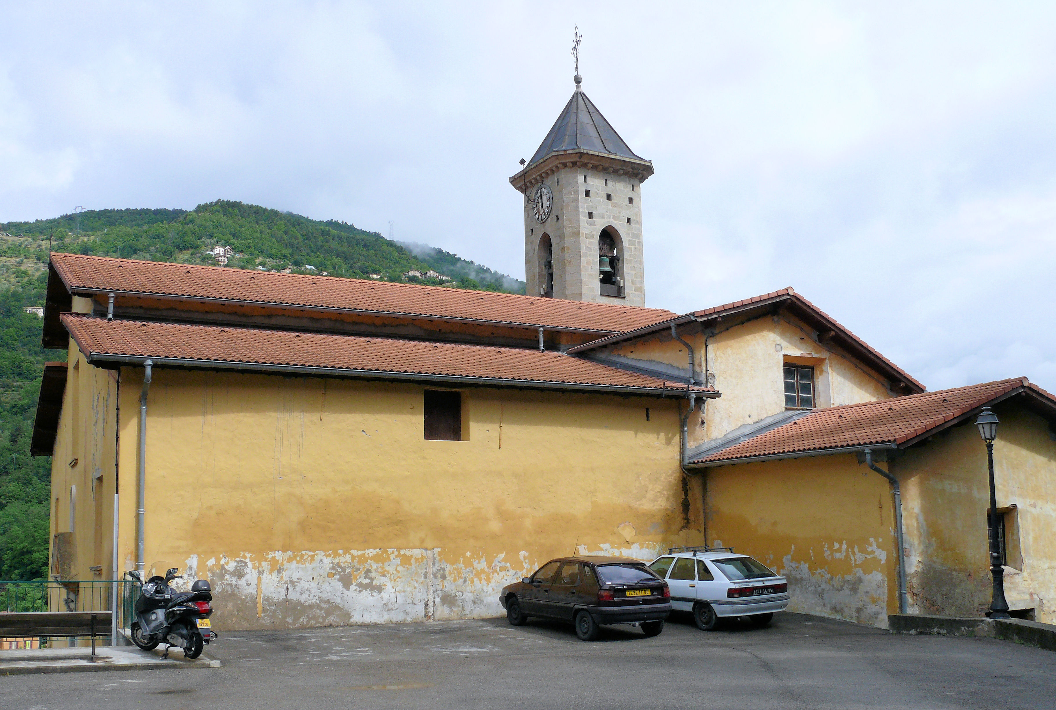 Lantosque - Eglise Saint-Sulpice